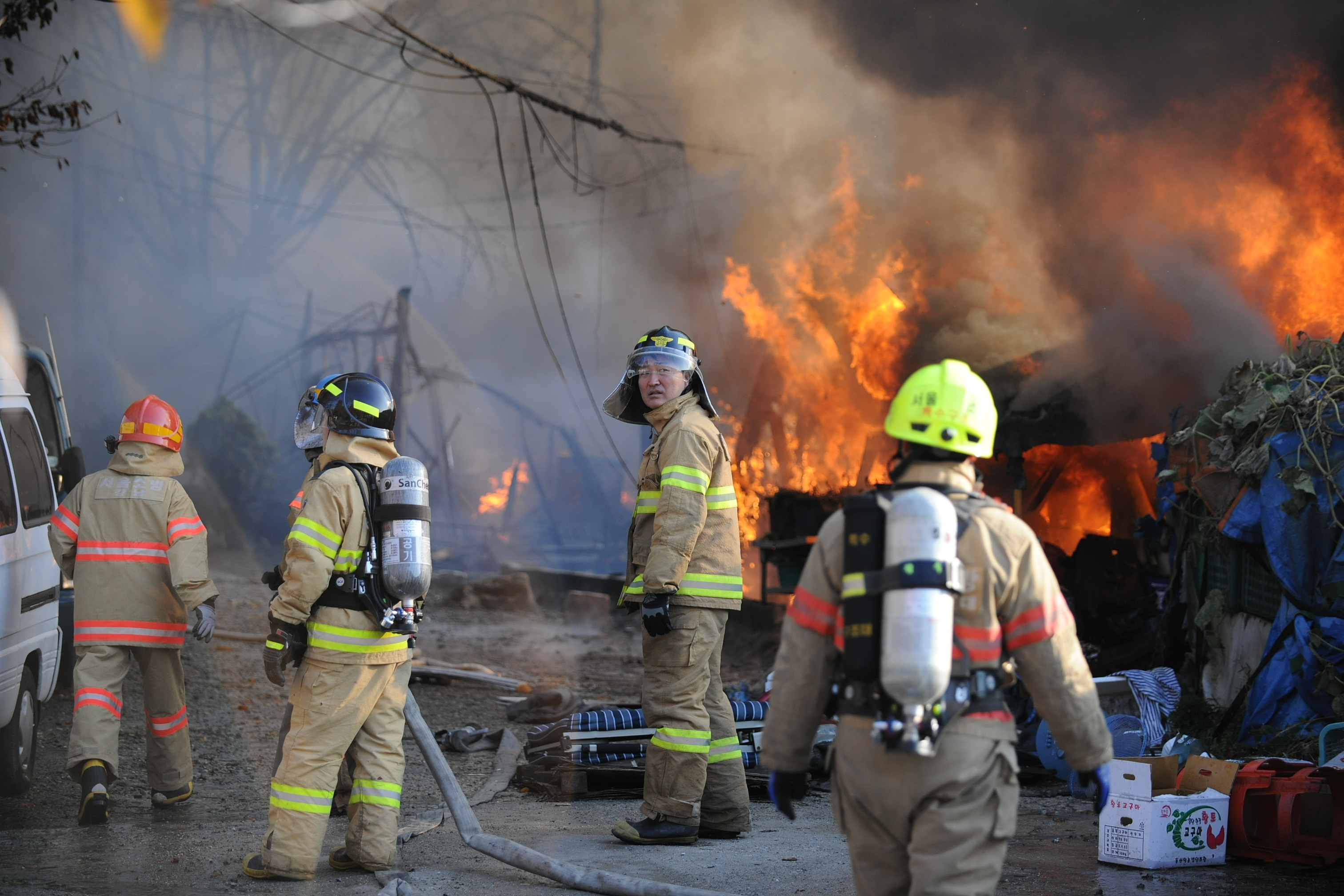 2014년 11월 9일 서울특별시 개포동 구룡마을 화재